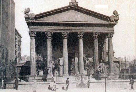 Barcelofilia. Foto: Àngel Toldrà Viazo. 1907